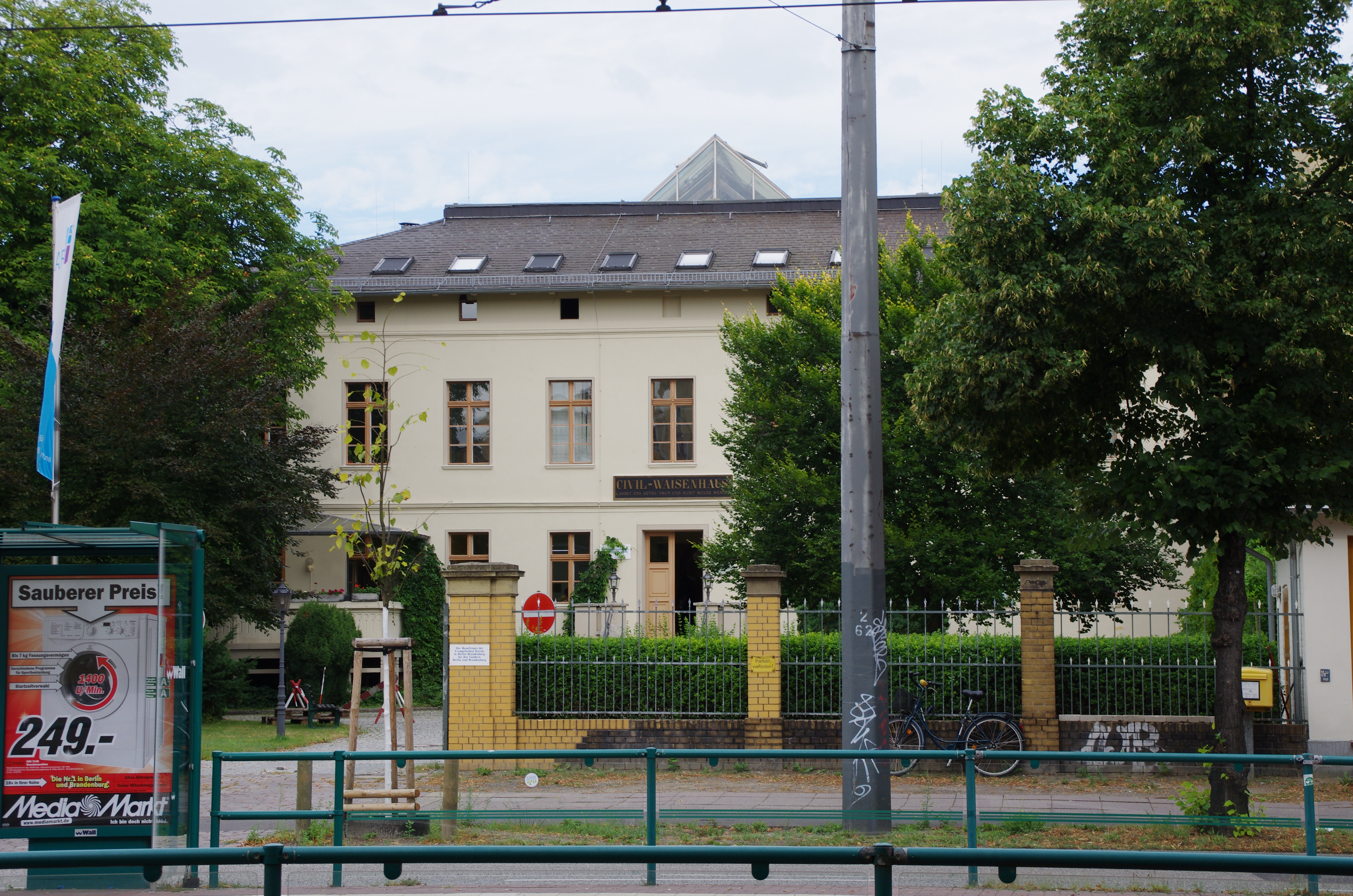 Potsdam in Brandenburg. Das Haus in der Straße Berliner Straße 148 steht unter Denkmalschutz.